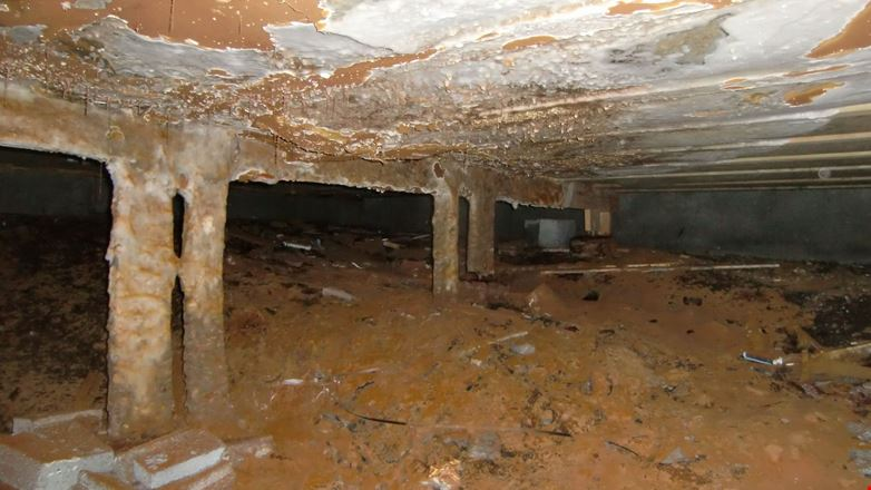 Krypkjeller